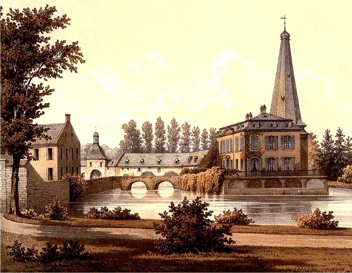 Schloss Linzenich, Kreis Jülich, Rhein-Provinz